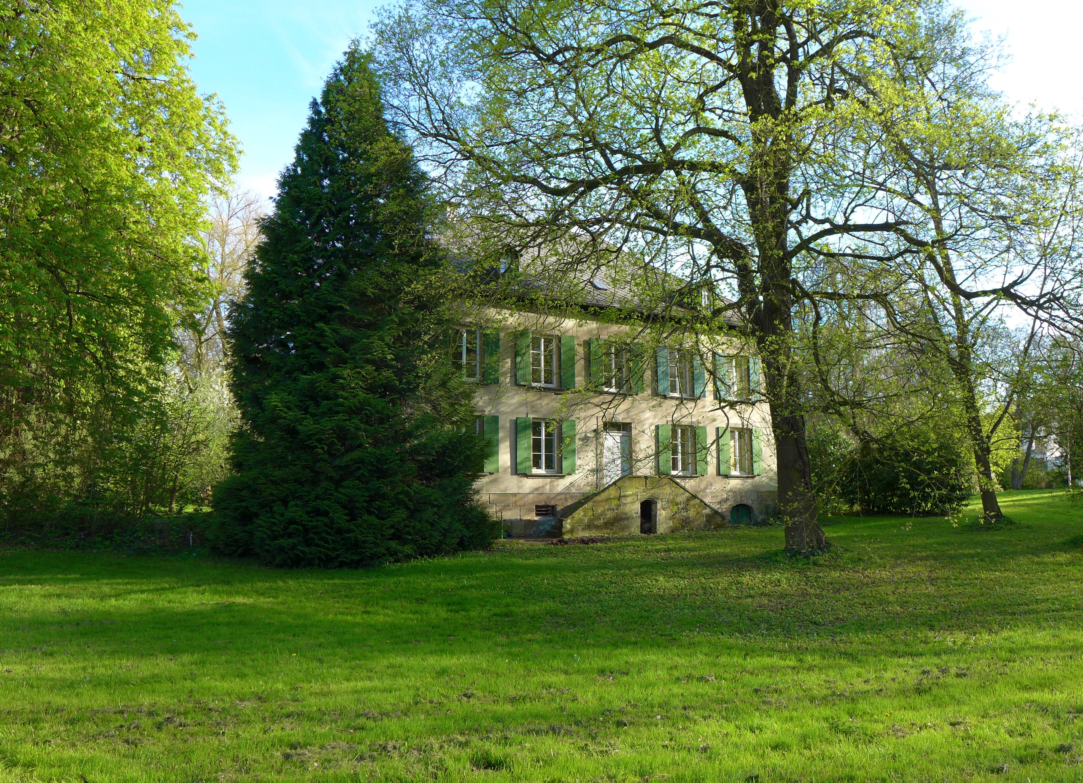 Wallerfangen; Salmshaus; Fünfachsiger, zweigeschossiger Putzbau; Das heutige Wohnhaus wurde in der ersten Hälfte des 19. Jahrhunderts als Halfenhaus erbaut.